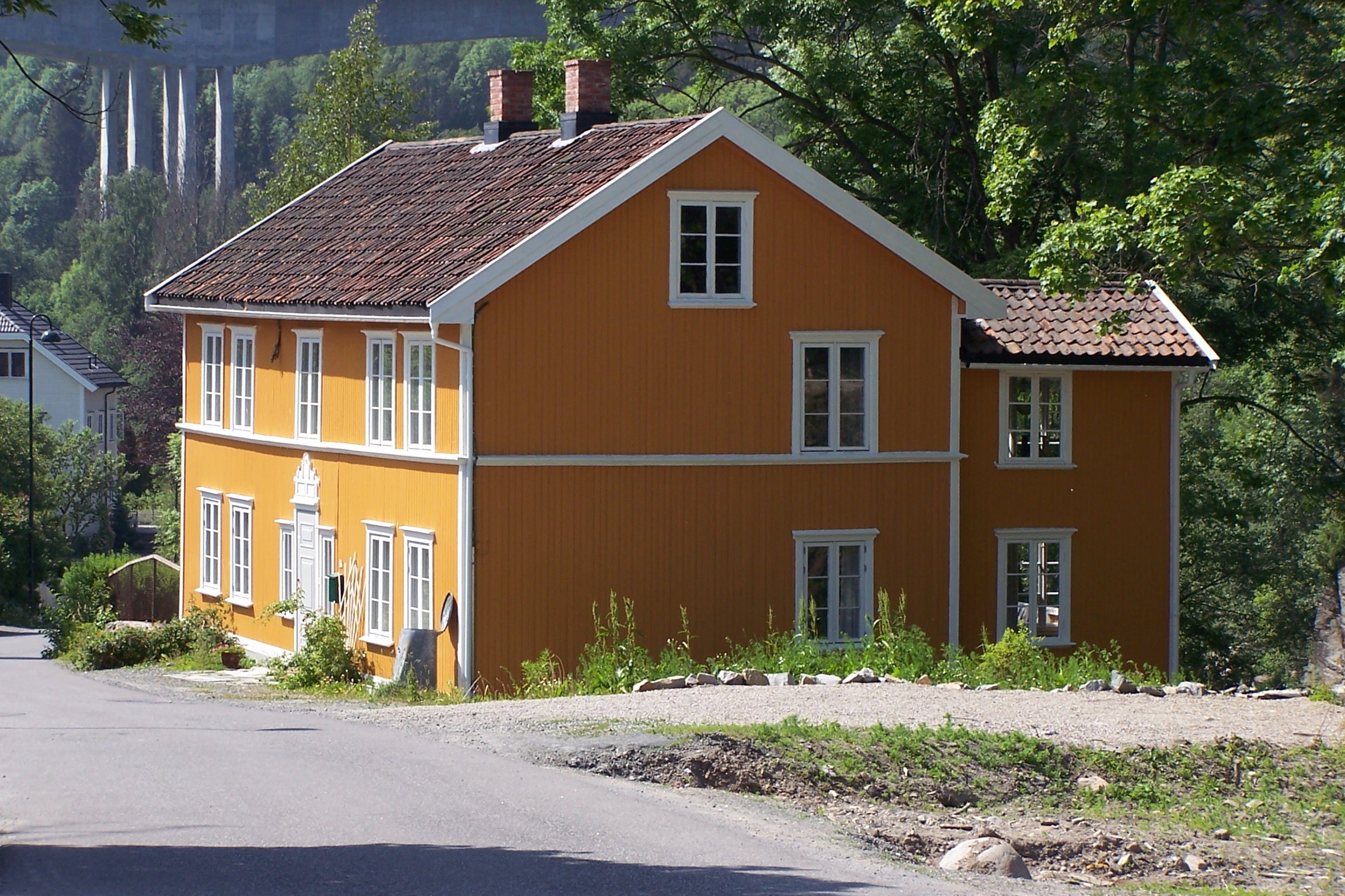 Hølen, "Håkensgården", originally a workers' residence